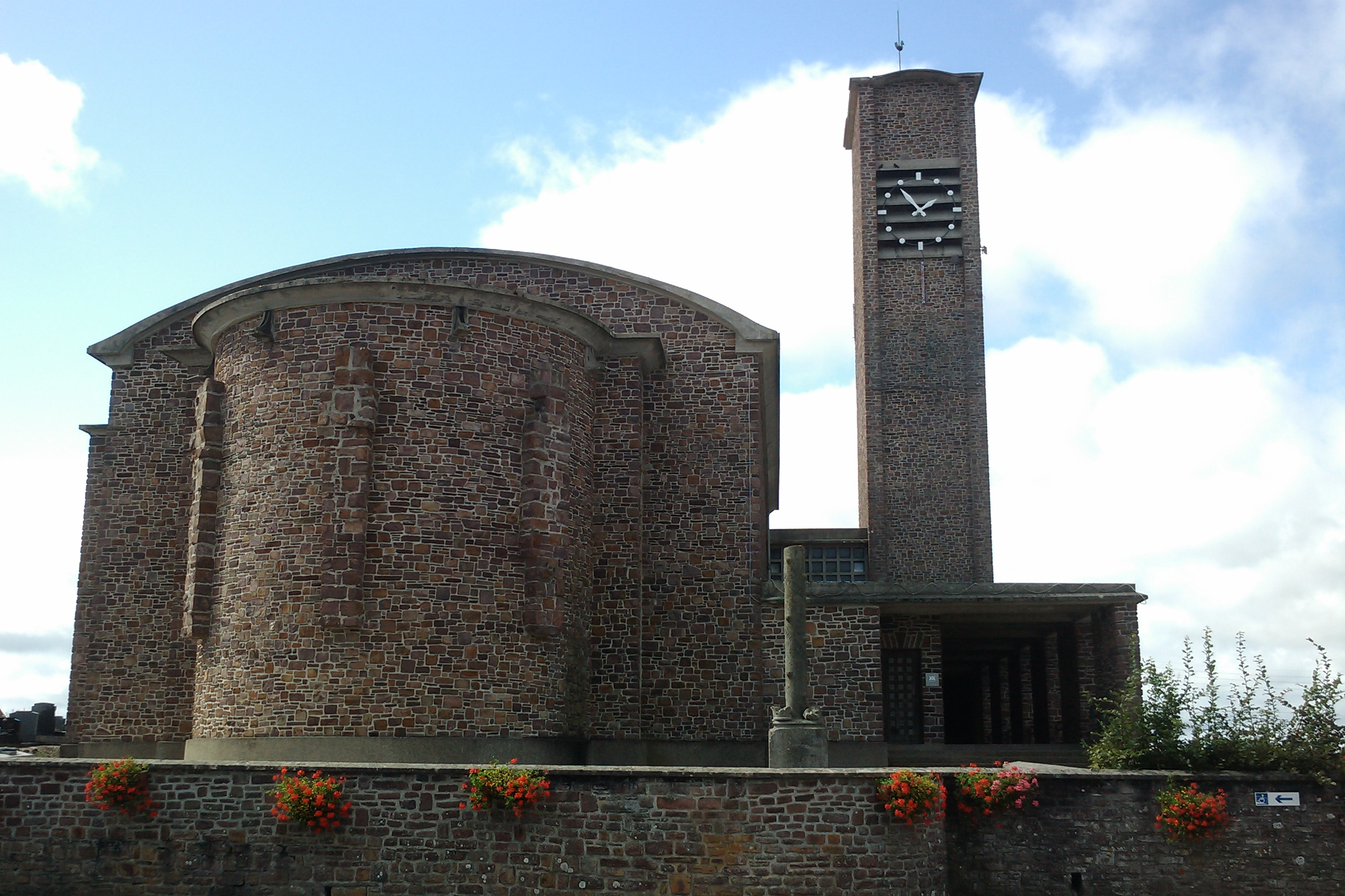 l'église d'